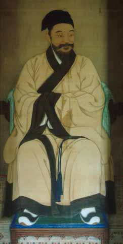 익재 이제현 영정, 18세기 모사본